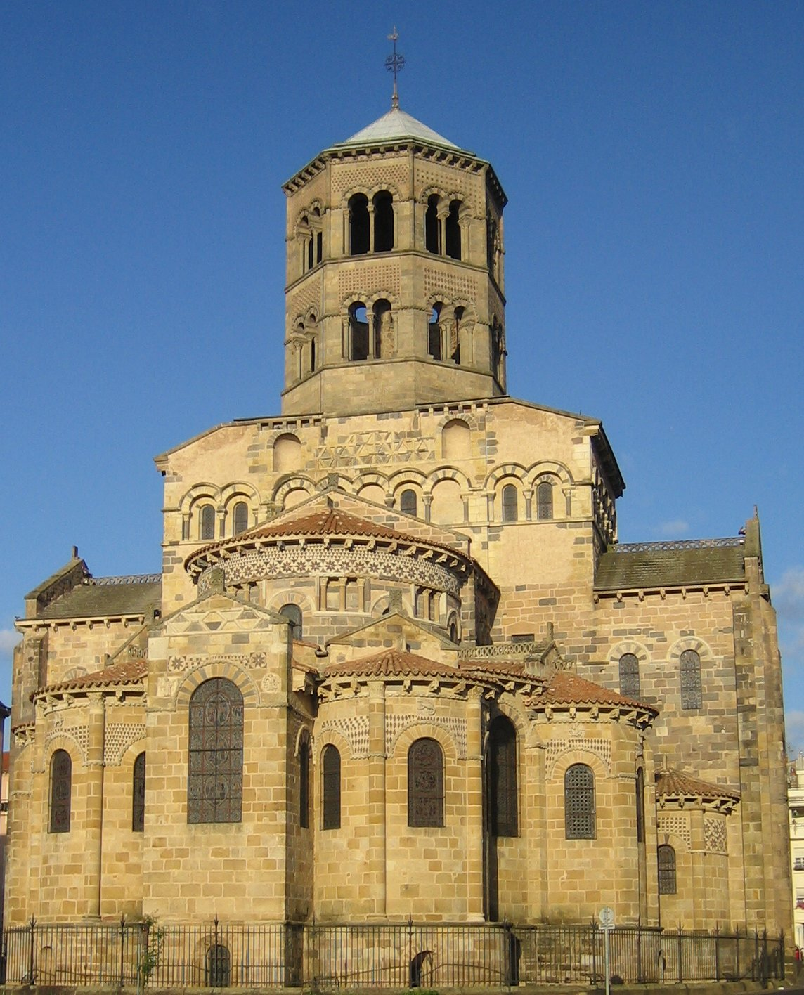 Abbatiale de Saint-Austremoine, in Issoire (France, Auvergne). Superb romanesque architecture.